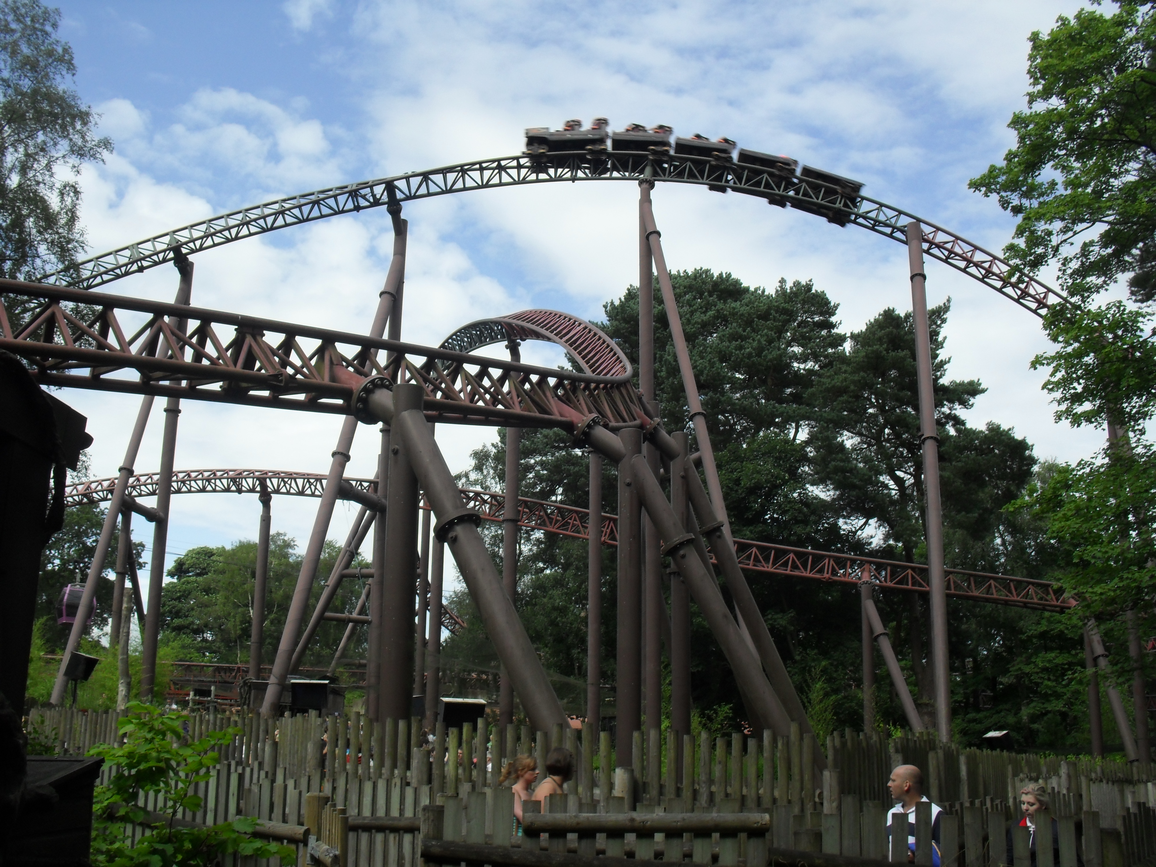 Les montagnes russes Rita à Alton Towers